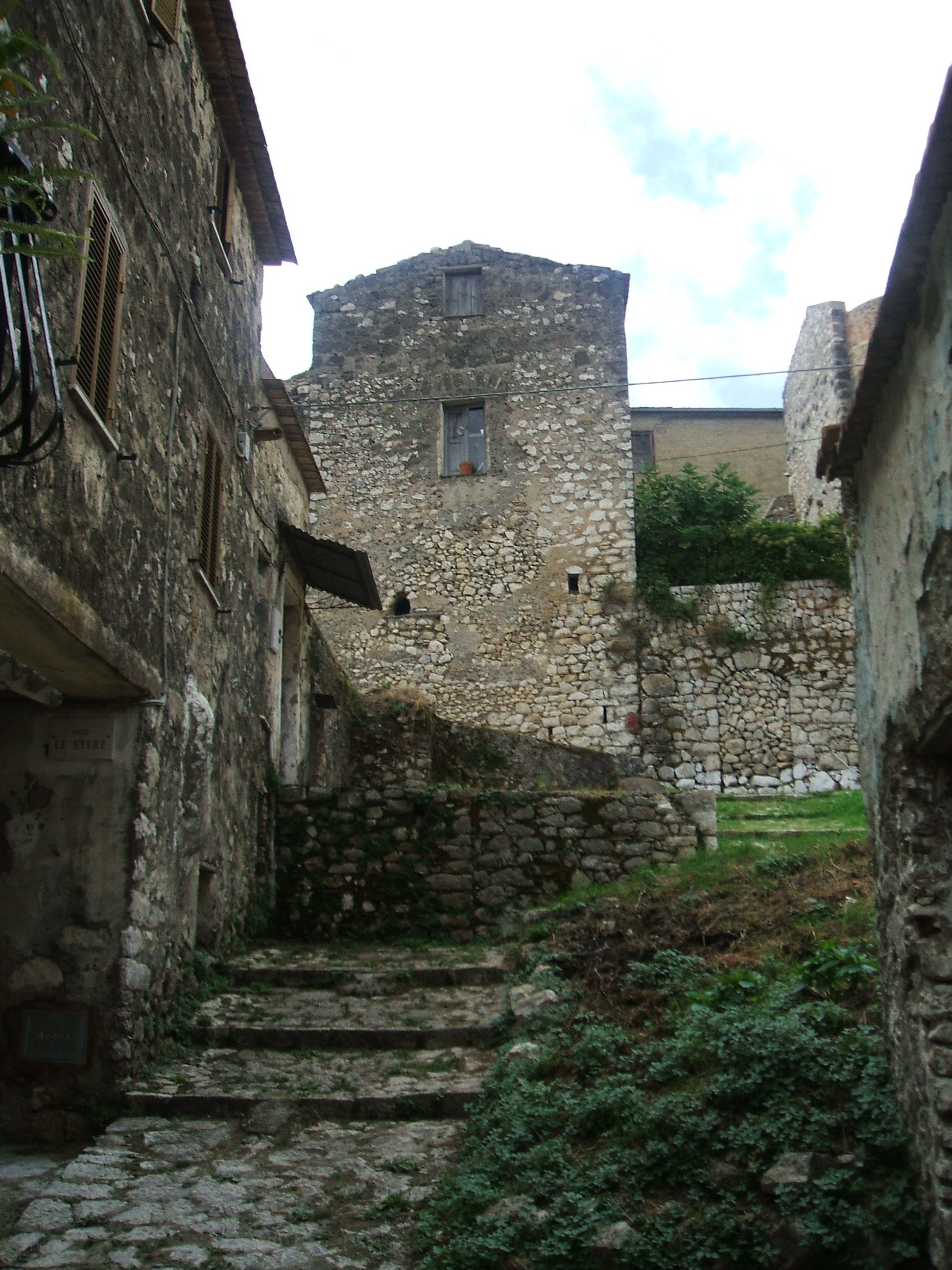 View of lane in Ventosa, Santi Cosma e Damiano (LT), Provincia di Latina, Regione Lazio (Latina Province, Latium Region, Italy).